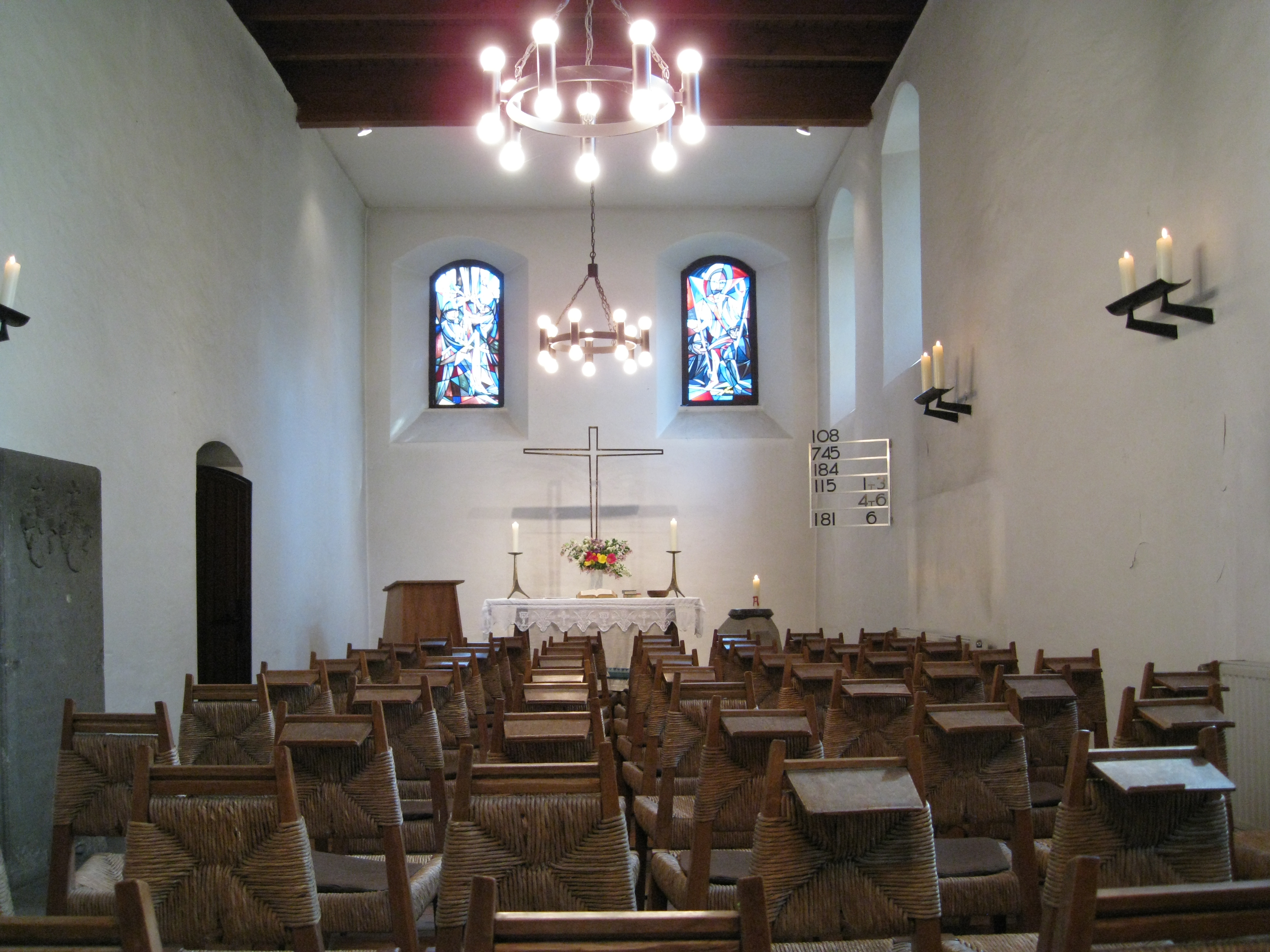 Dorfkirche Giesensdorf Blick Richtung Altar